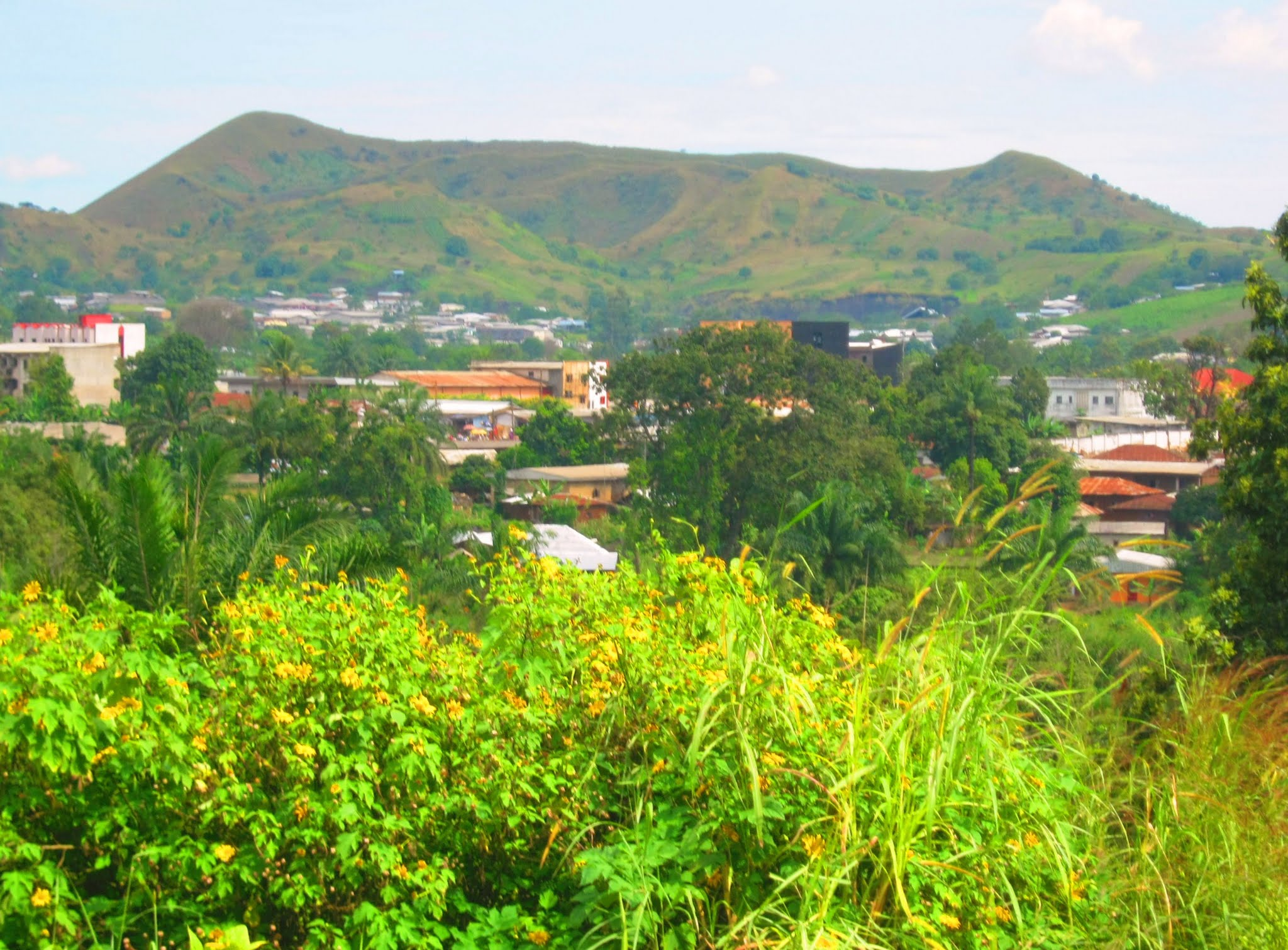 Une vue de la ville de Foumbot, Ouest du Cameroun